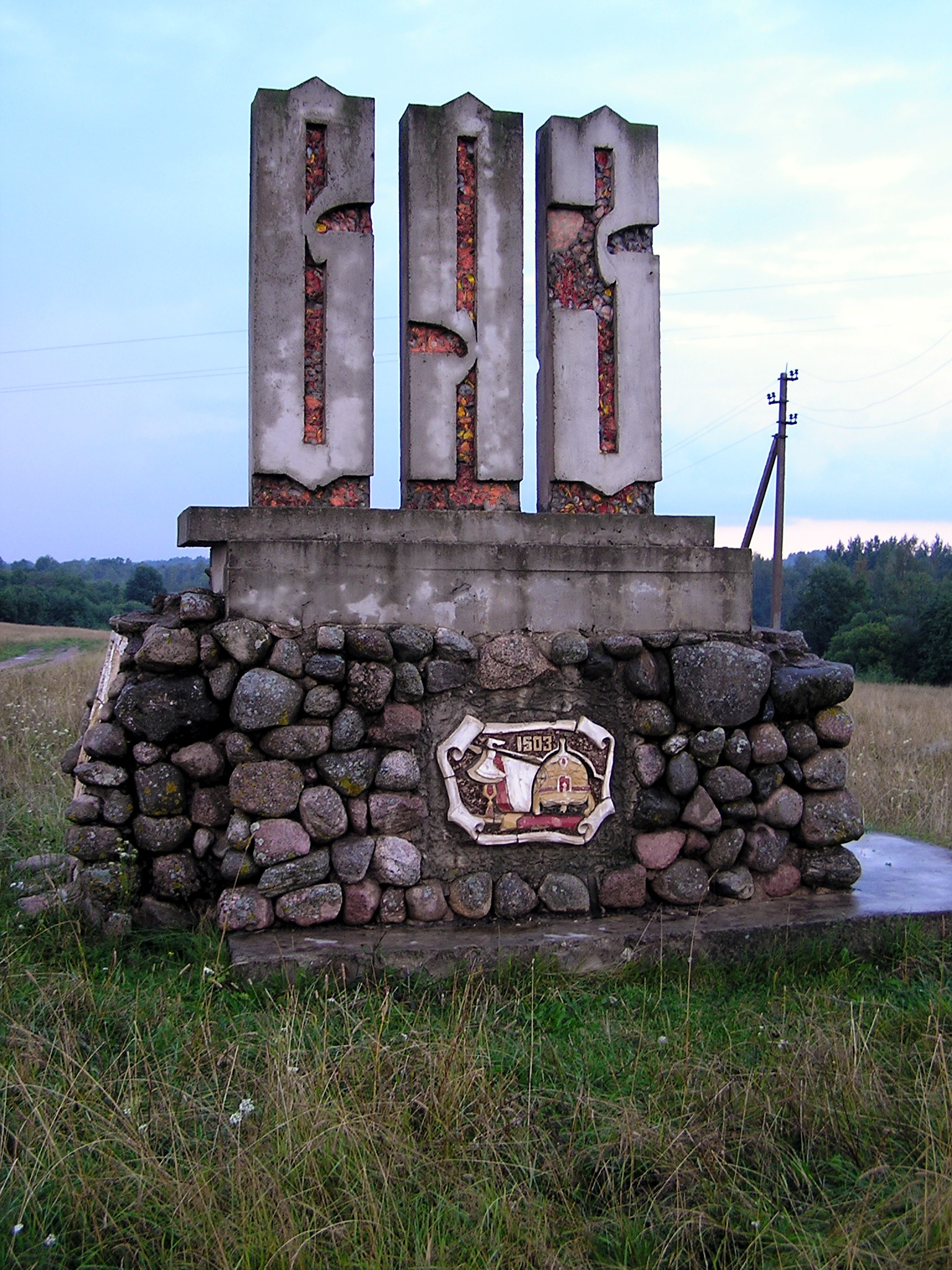 "Вяз" - 500 лет